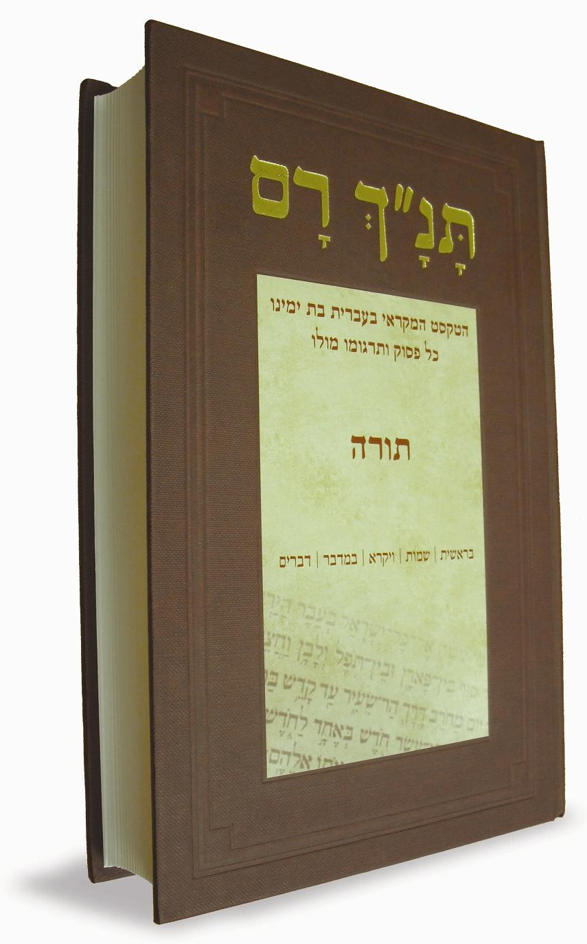 he:תנ"ך רם - התורה